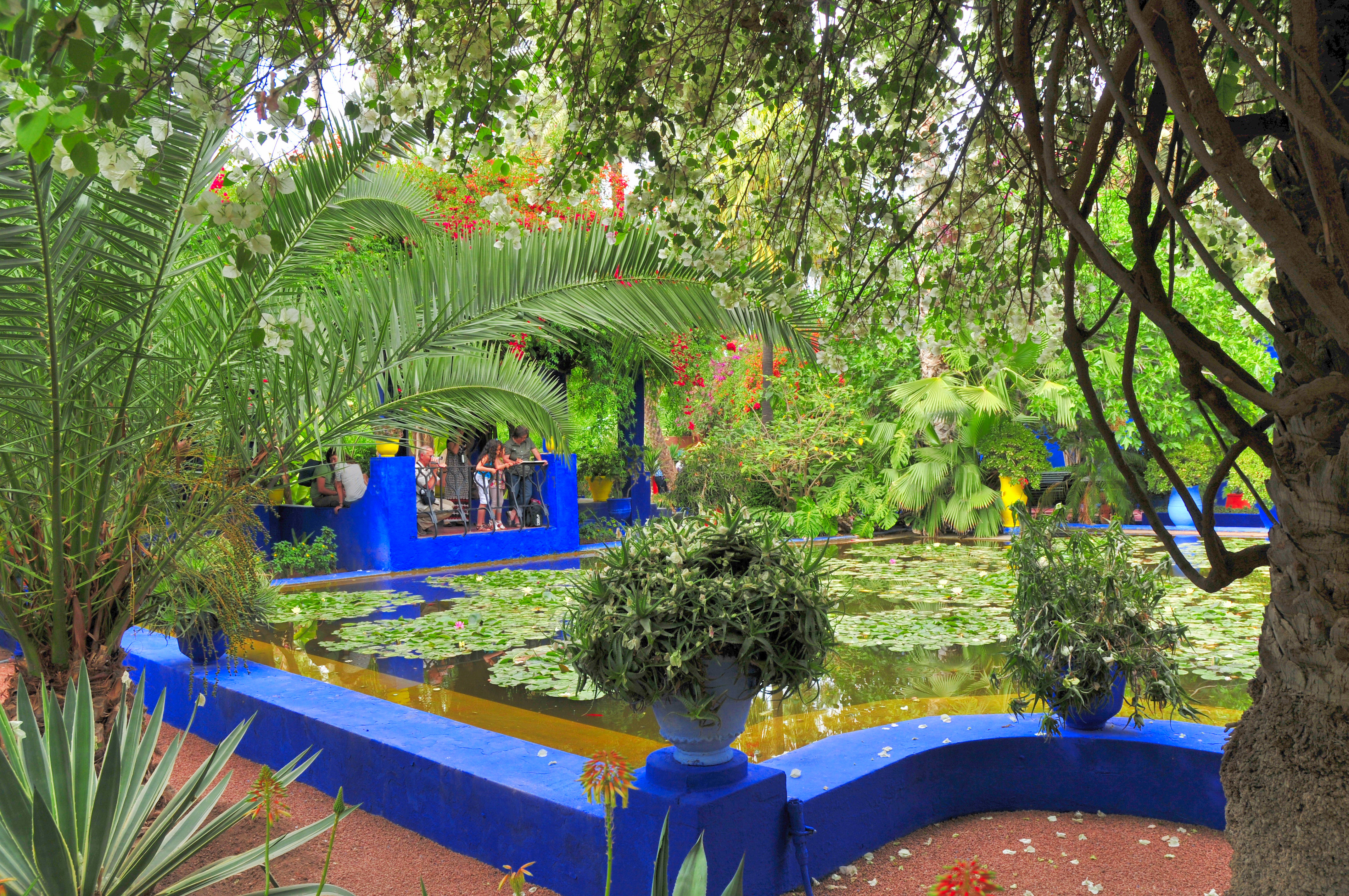 Jardin_des_majorel\Le Jardin des majorel 8.JPG marrakrch maroc